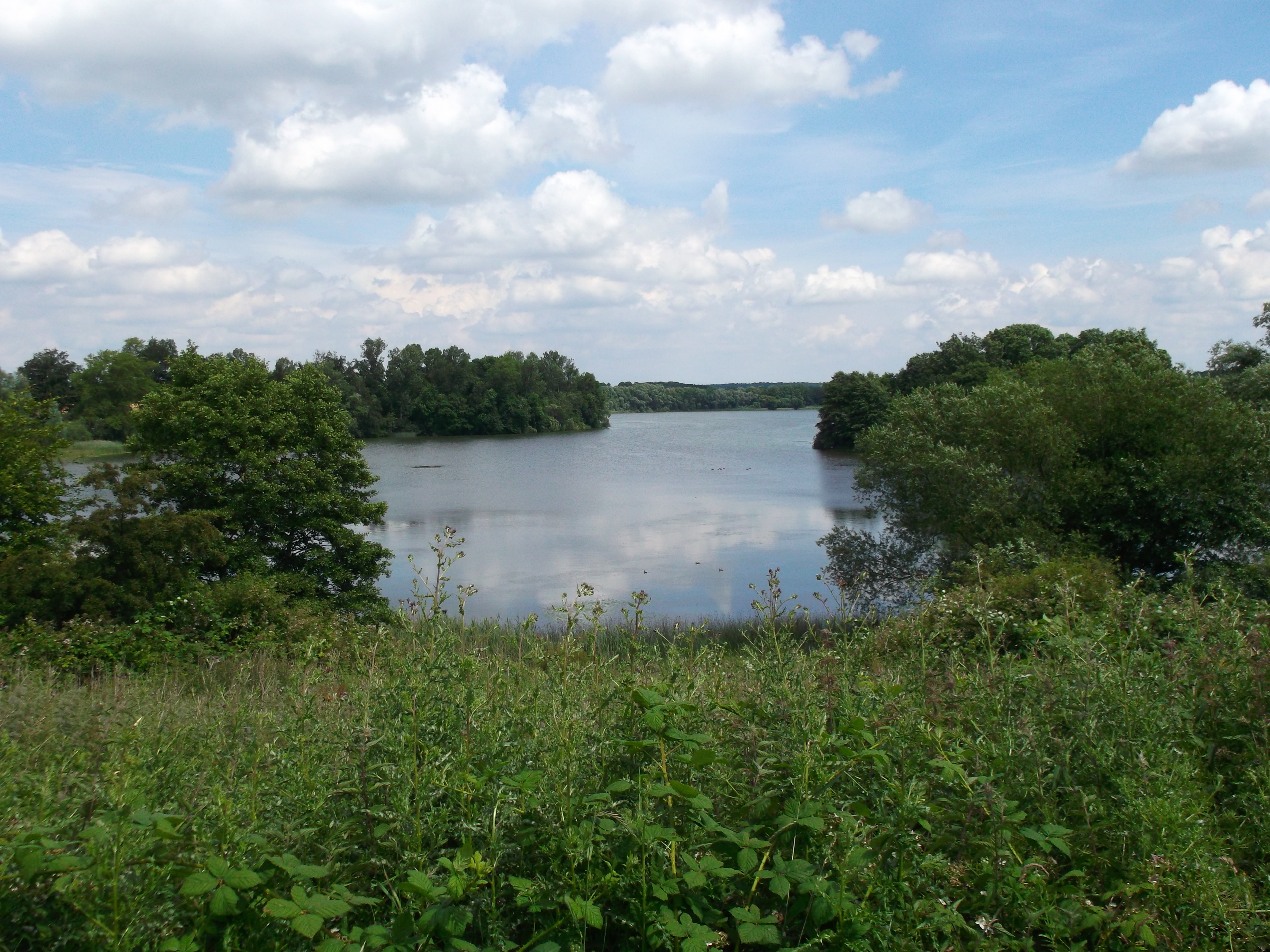 Blick auf den Goldenesee, Naturschutzgebiet Goldensee. Der See liegt auf der Grenze zwischen Herzogtum Lauenburg und Nordwestmecklenburg.